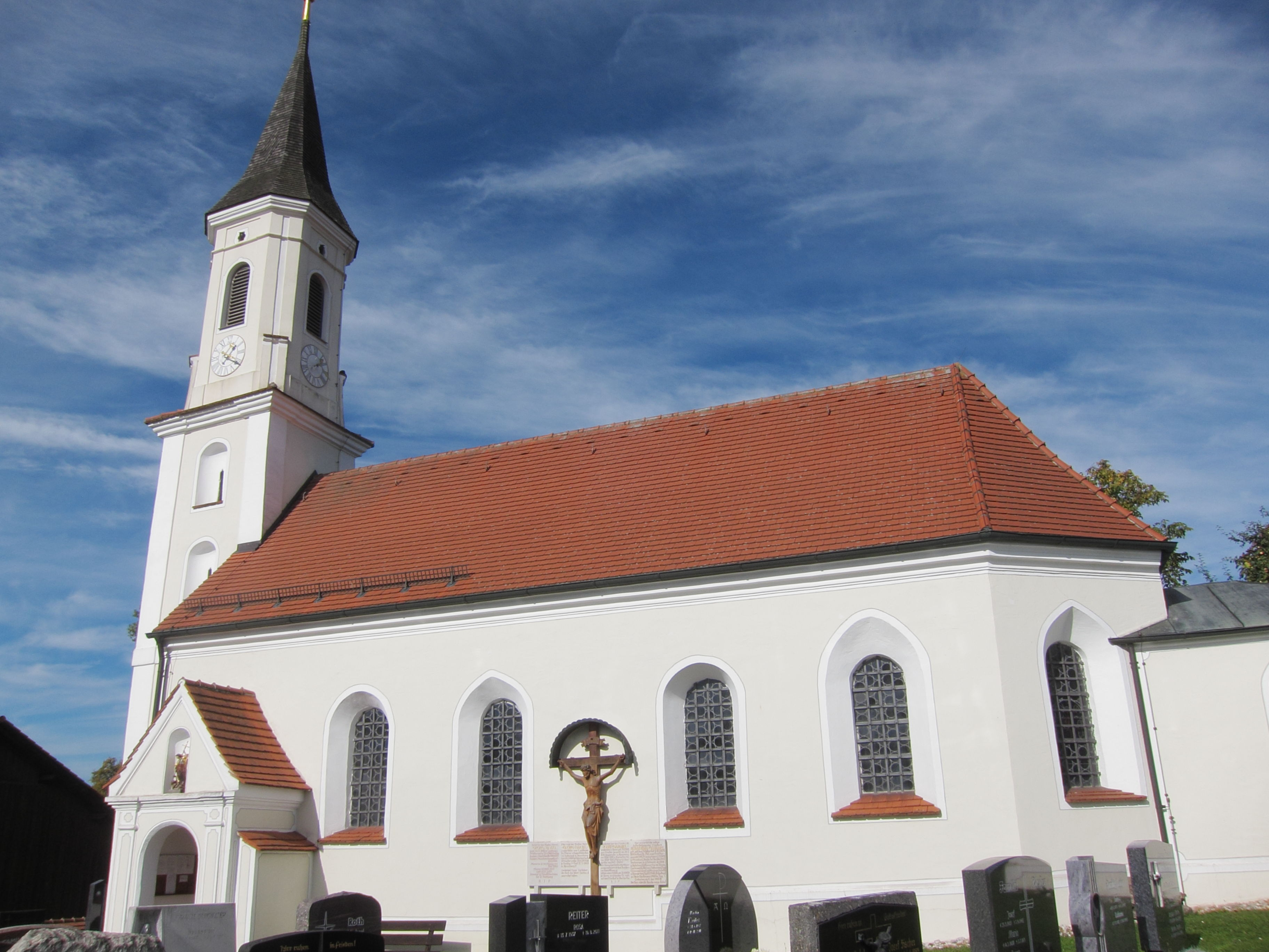 Thann; kath. Kirche St. Michael; spätgotischer Bau, 1708 barockisiert; mit Ausstattung.